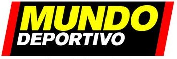 Imagen Mundo deportivo